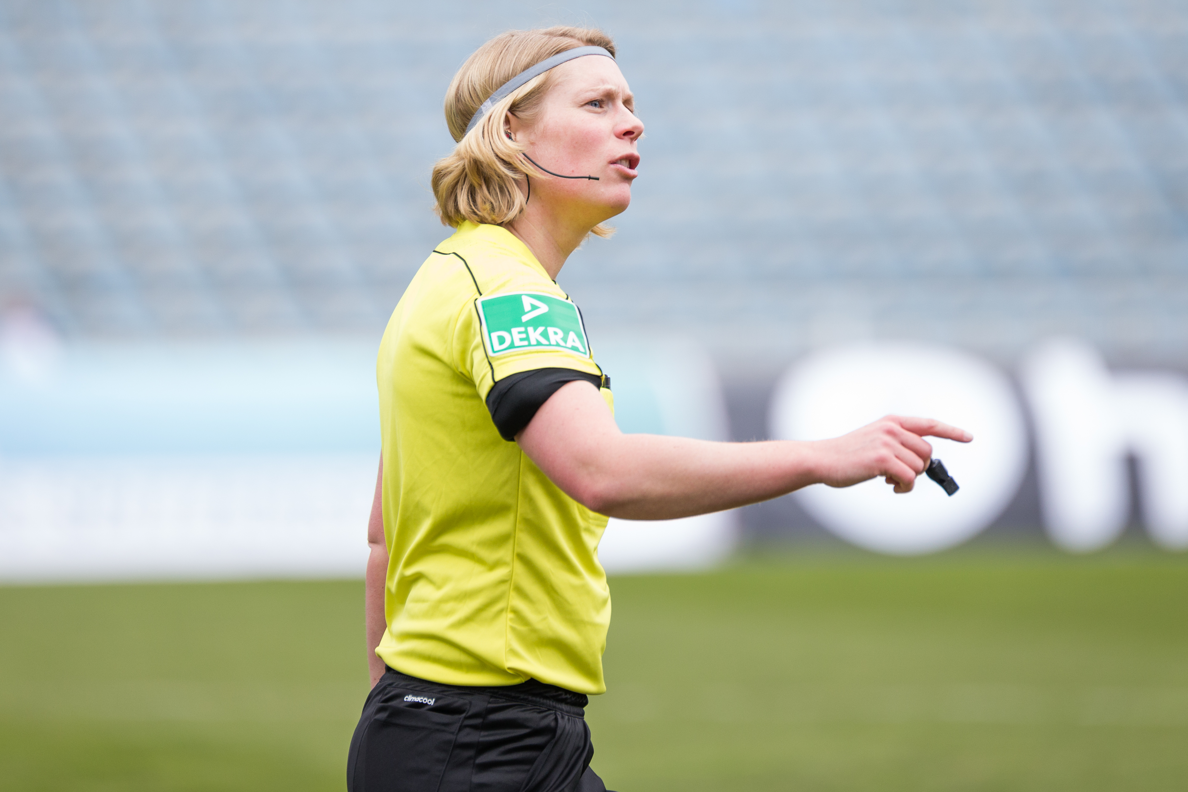 Schiedsrichterin, referee Mirka Derlin; Freisteller, Einzelbild